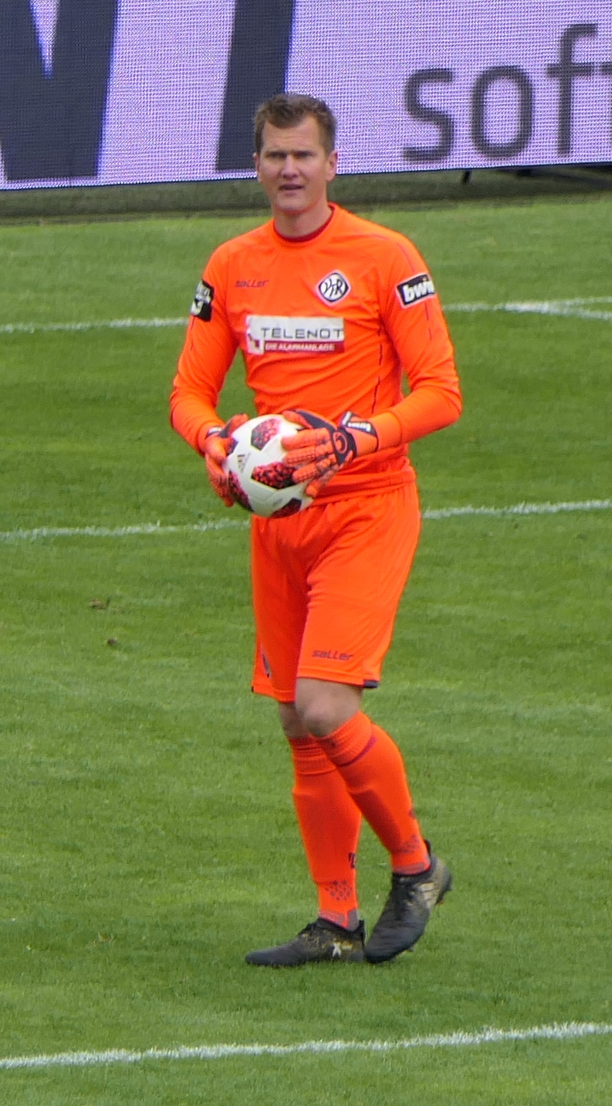 Der Fussballprofi Daniel Bernhardt im Trikot des VfR Aalen beim Heimspiel gegen Eintracht Braunschweig am 05.05.2019.